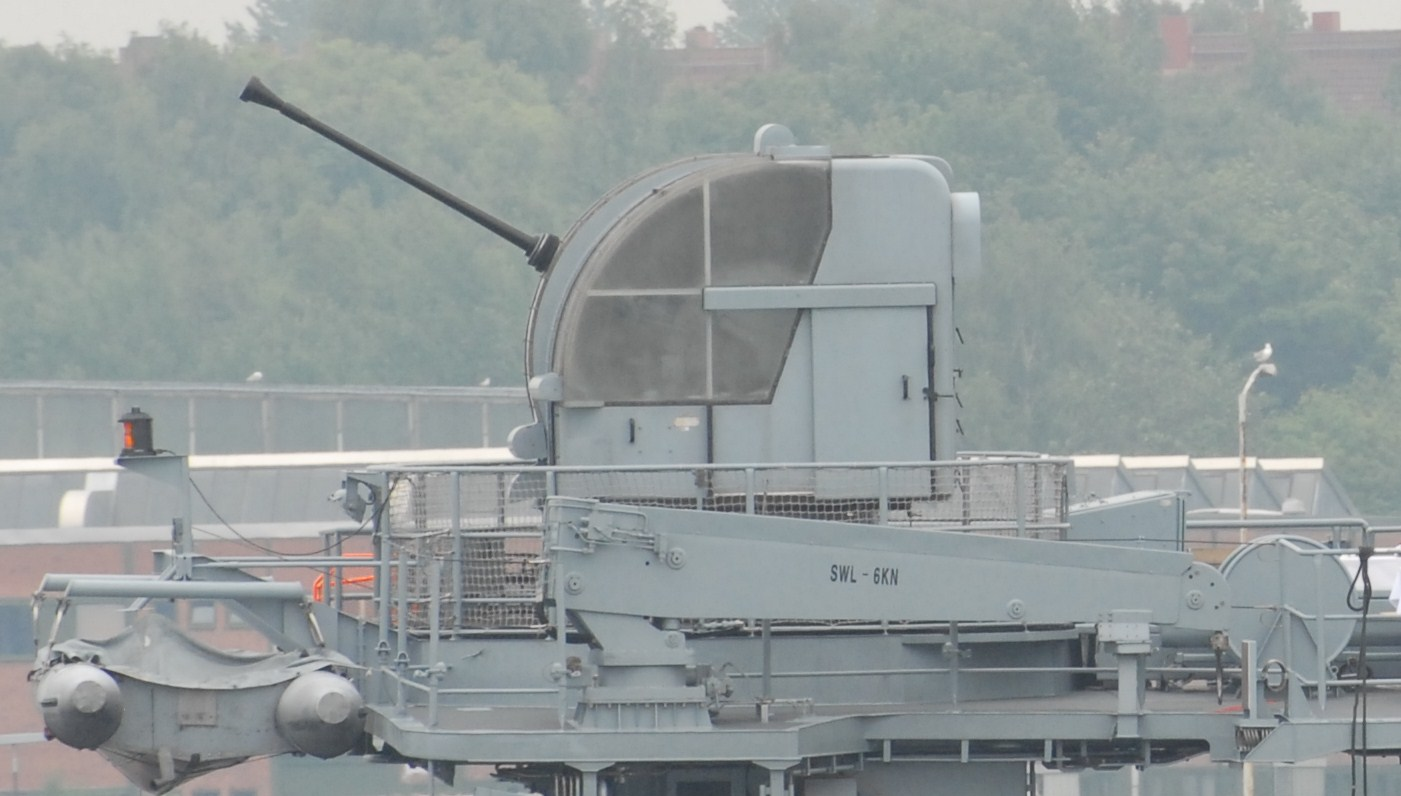 Schiffsgeschütz des Minensuchbootes Hameln: 40 mm Bofors Flak L/70 Mod.58